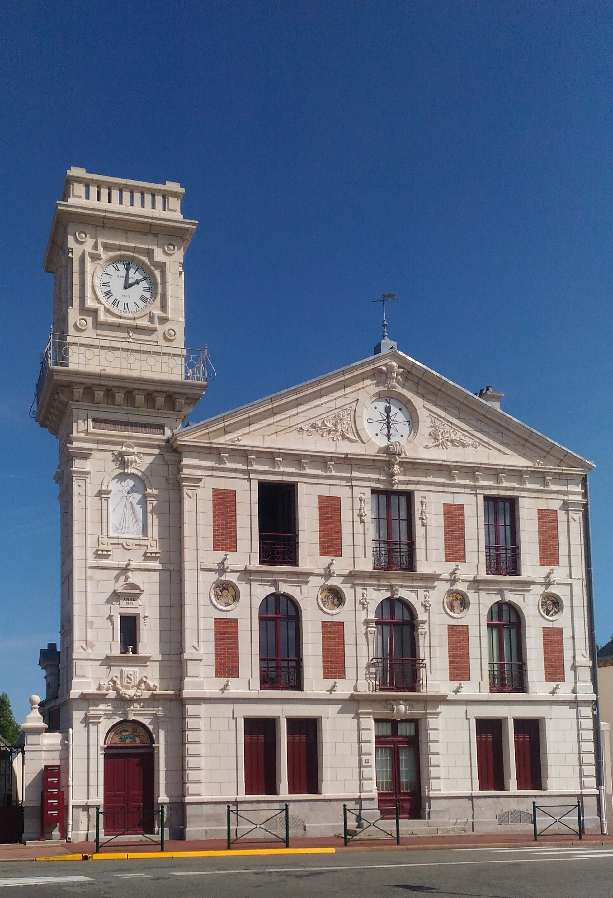 Ouvert à la visite le deuxième du mois de 14h à 17h